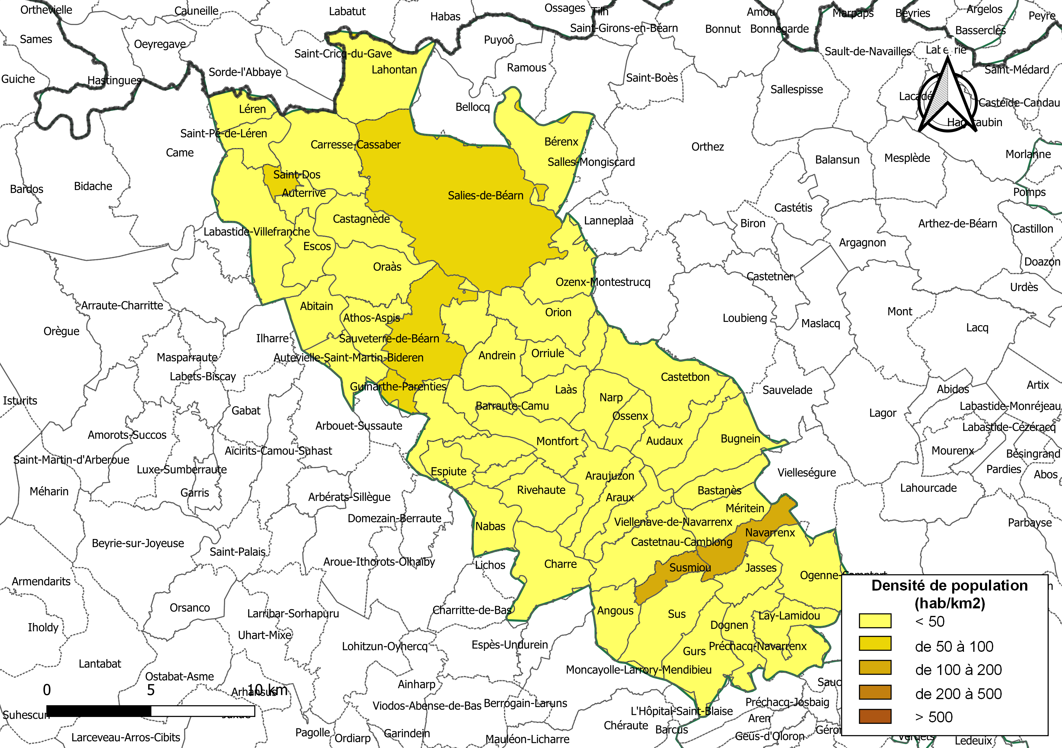 Carte des densités de population (millésimée 2016) des communes de la Communauté de communes du Béarn des Gaves, département des Pyrénées-Atlantiques, France. Composition au 1er janvier 2019.